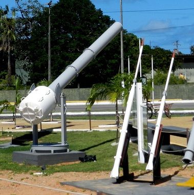 Em primeiro plano, os foguetes HASP e Loki-Dart. Ao fundo, o lançador do foguete ARCAS, que tem na sua base um pistão acionado por material combustível.